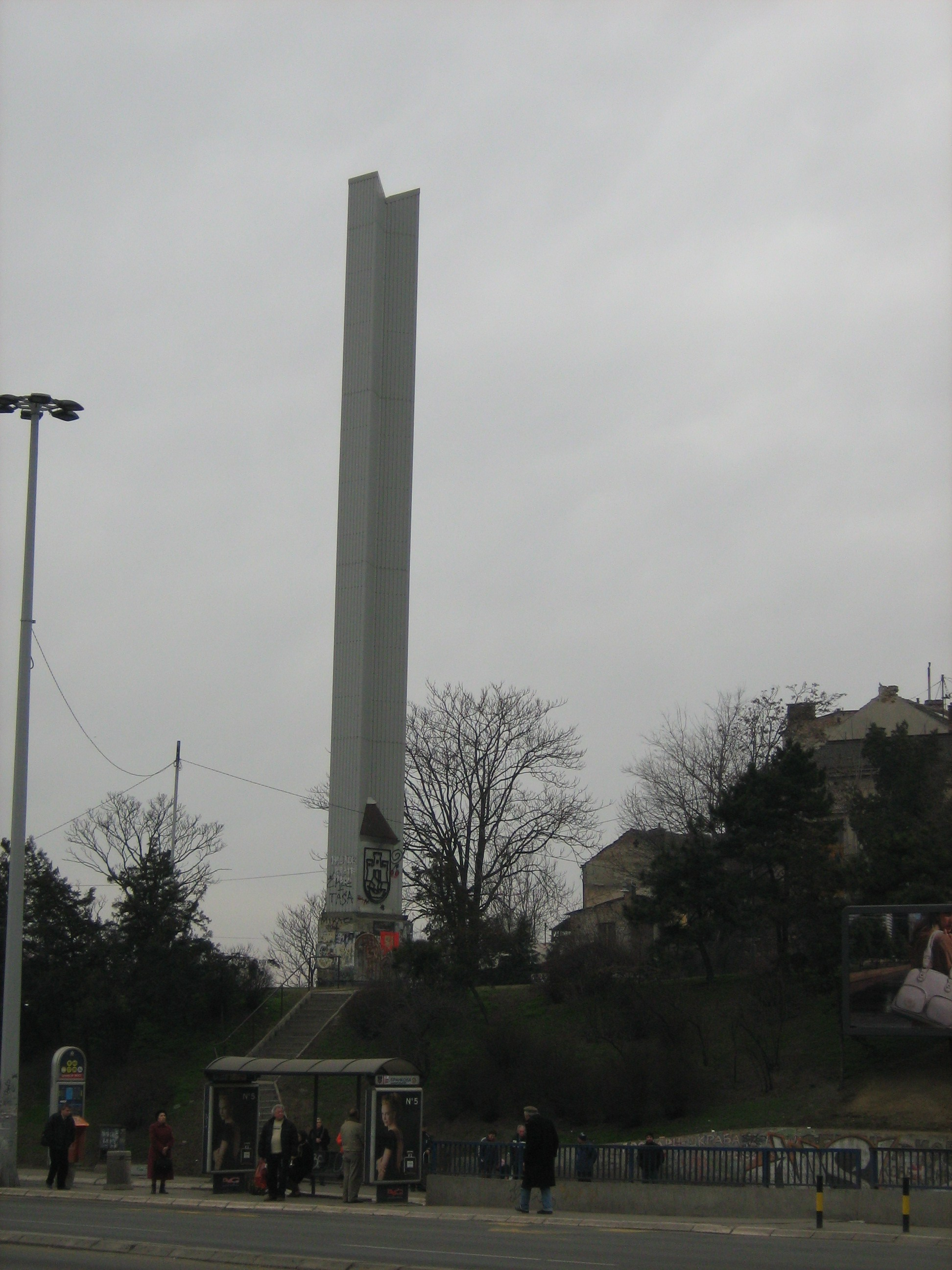 Косанчићев венац - споменик